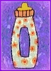 Biberon con agarre.